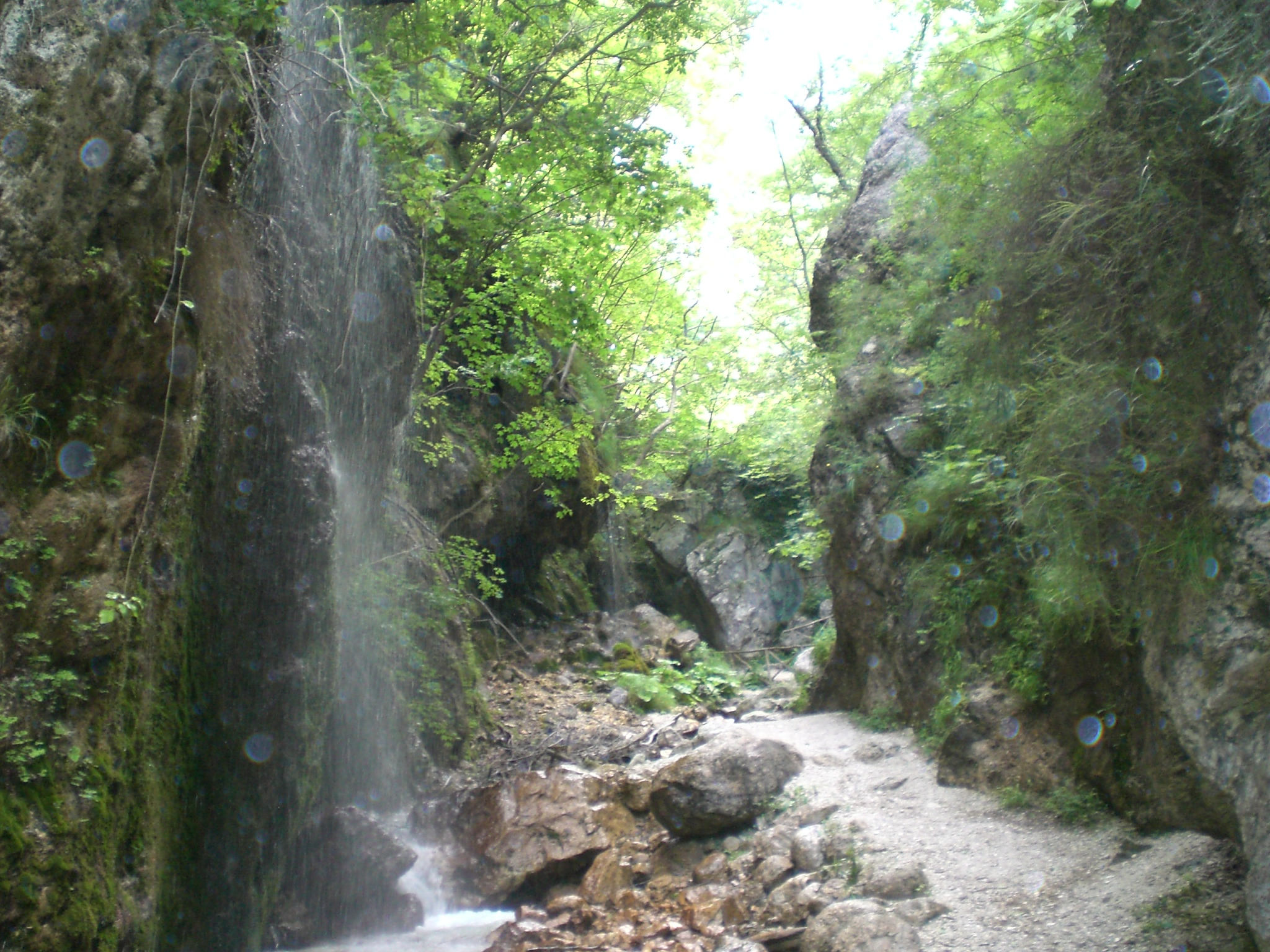 valle della caccia